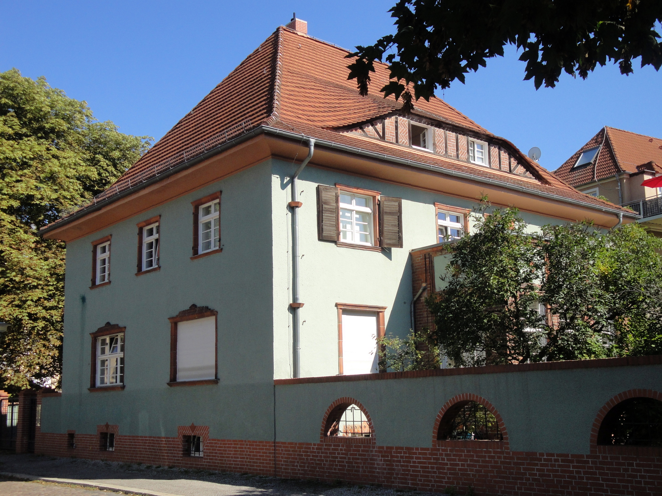 Corpshaus Corps Borussia Halle in Halle (Saale)